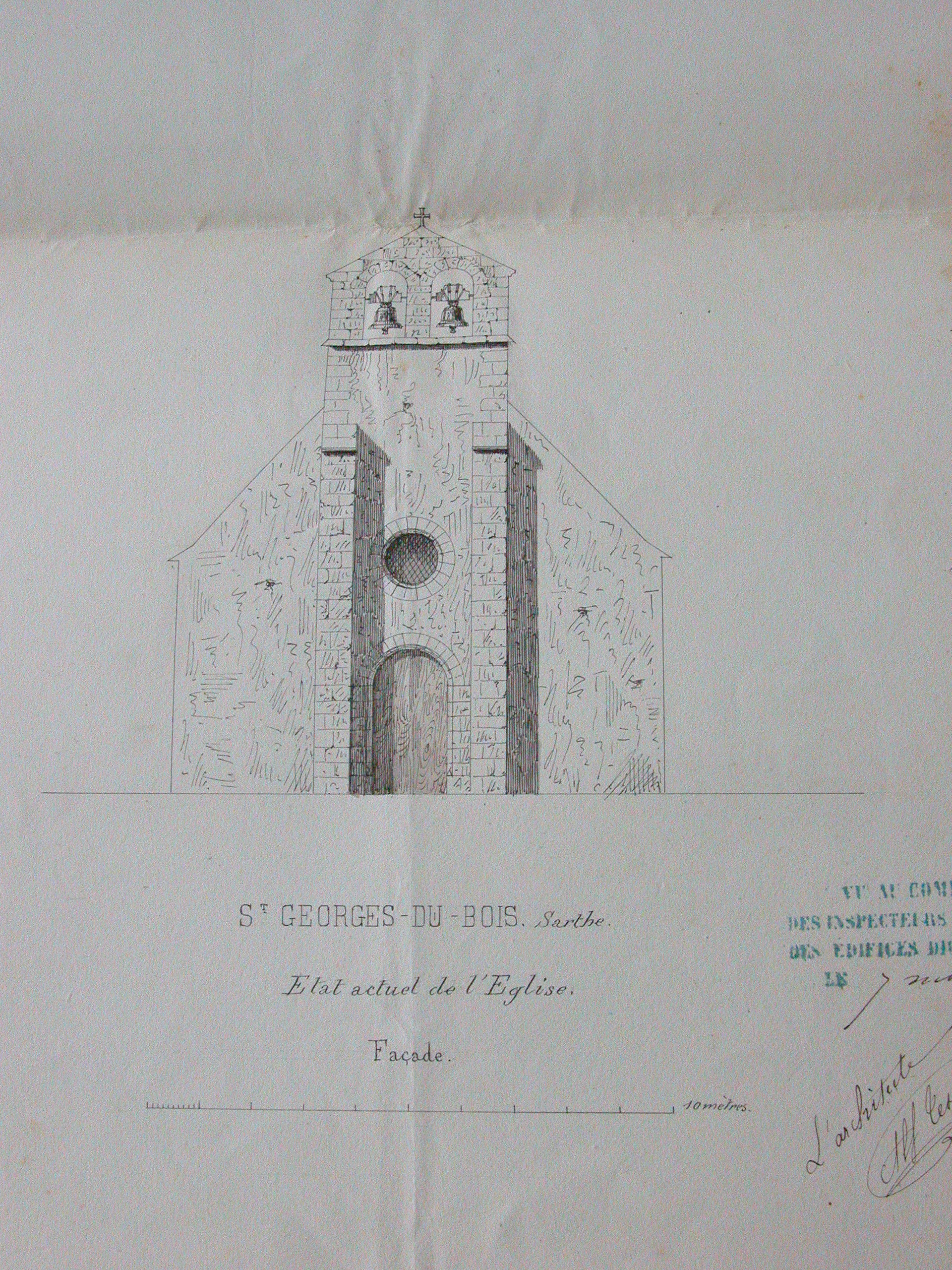 Ancienne façade de l'église de Saint-Georges-du-Bois dans le département français de la Sarthe, en 1855.